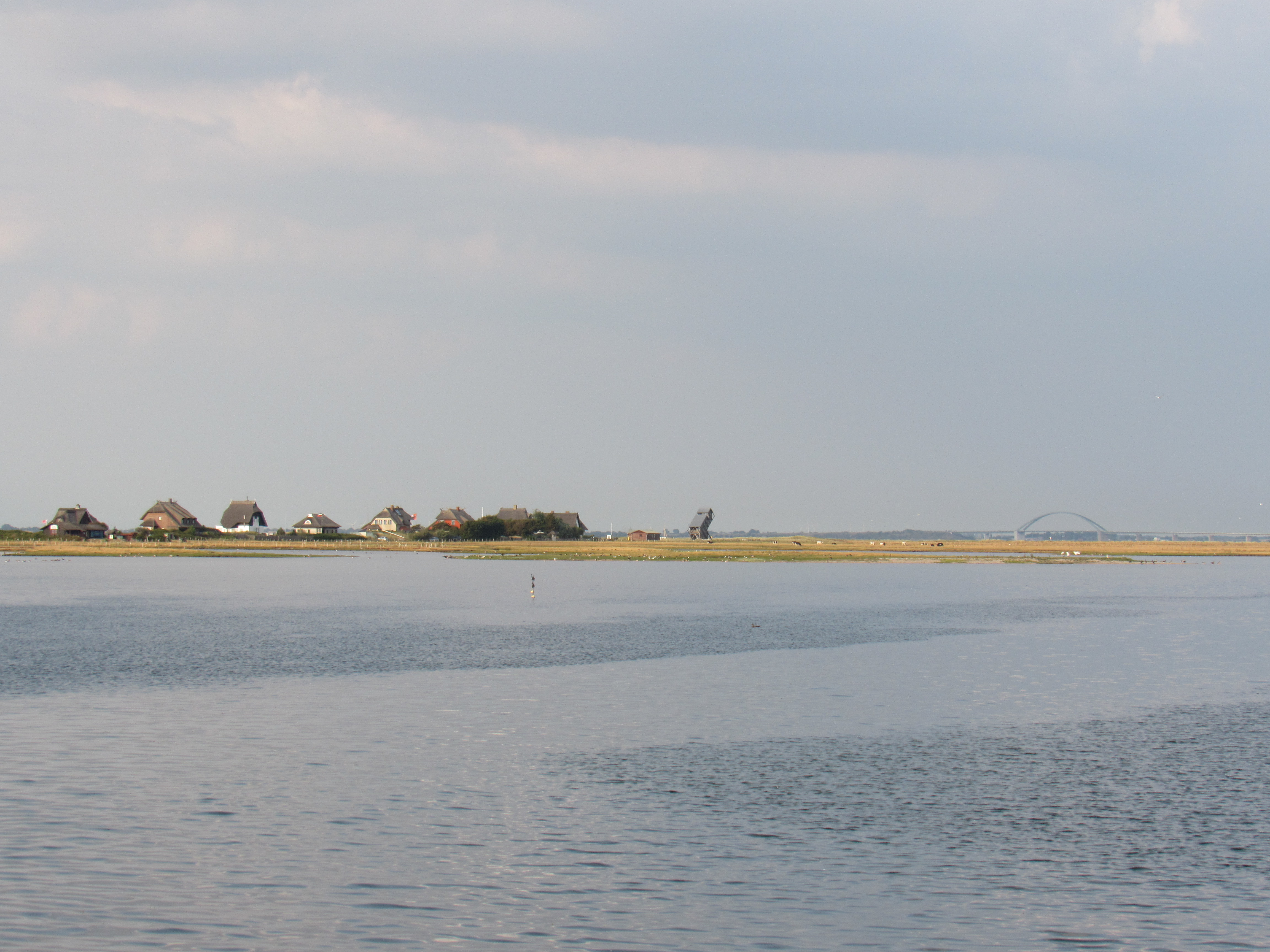 Blick vom Hafen zum Graswarder, Heiligenhafen; denkmalgeschützte Strandhäuser Graswarder(weg) 12 (links) bis 19 (rechts) und Aussichtsturm (Bildmitte), davor Teile des Naturschutzgebiets „Graswarder/Heiligenhafen“, am Horizont rechts die Fehmarnsundbrücke